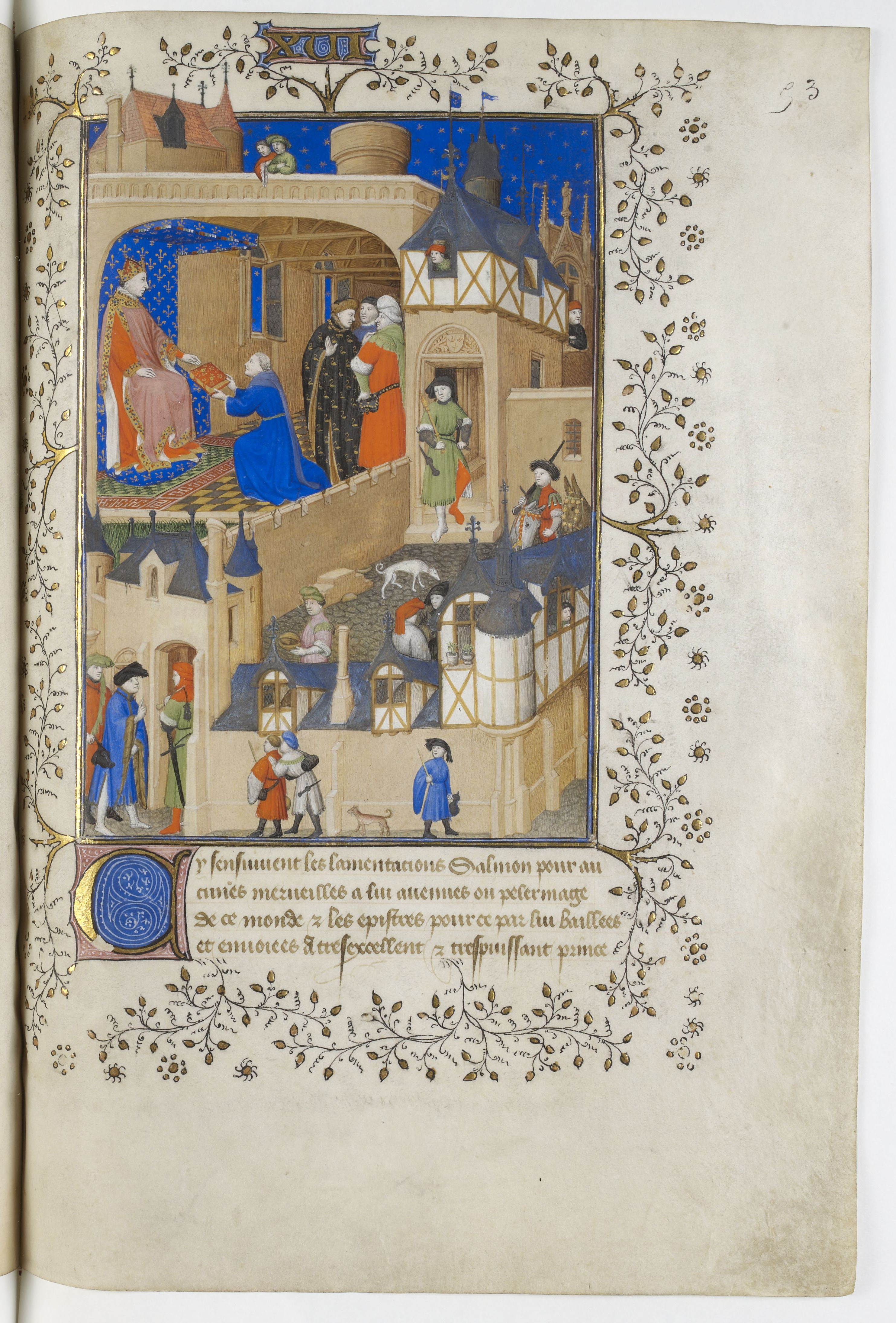 Charles VI recevant l'hommage du livre de Pierre Salmon devant Jean de Berry et Jean de Bourgogne au sein d'une représentation possible de l'hôtel Saint-Paul à Paris.